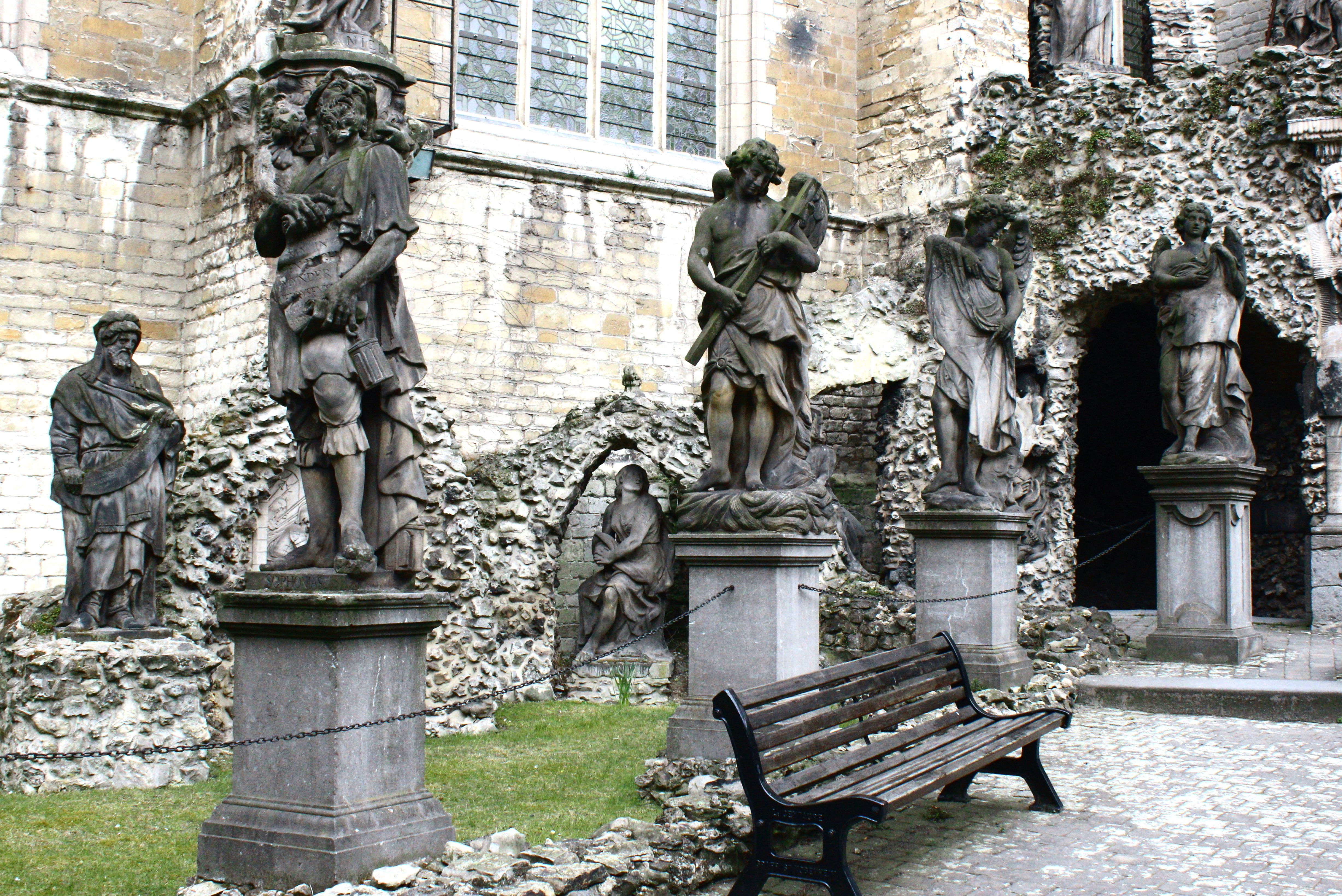 Sint-Pauluskerk, Antwerpen, België. Barokke calvarie (van 1697-99 tot 1741)